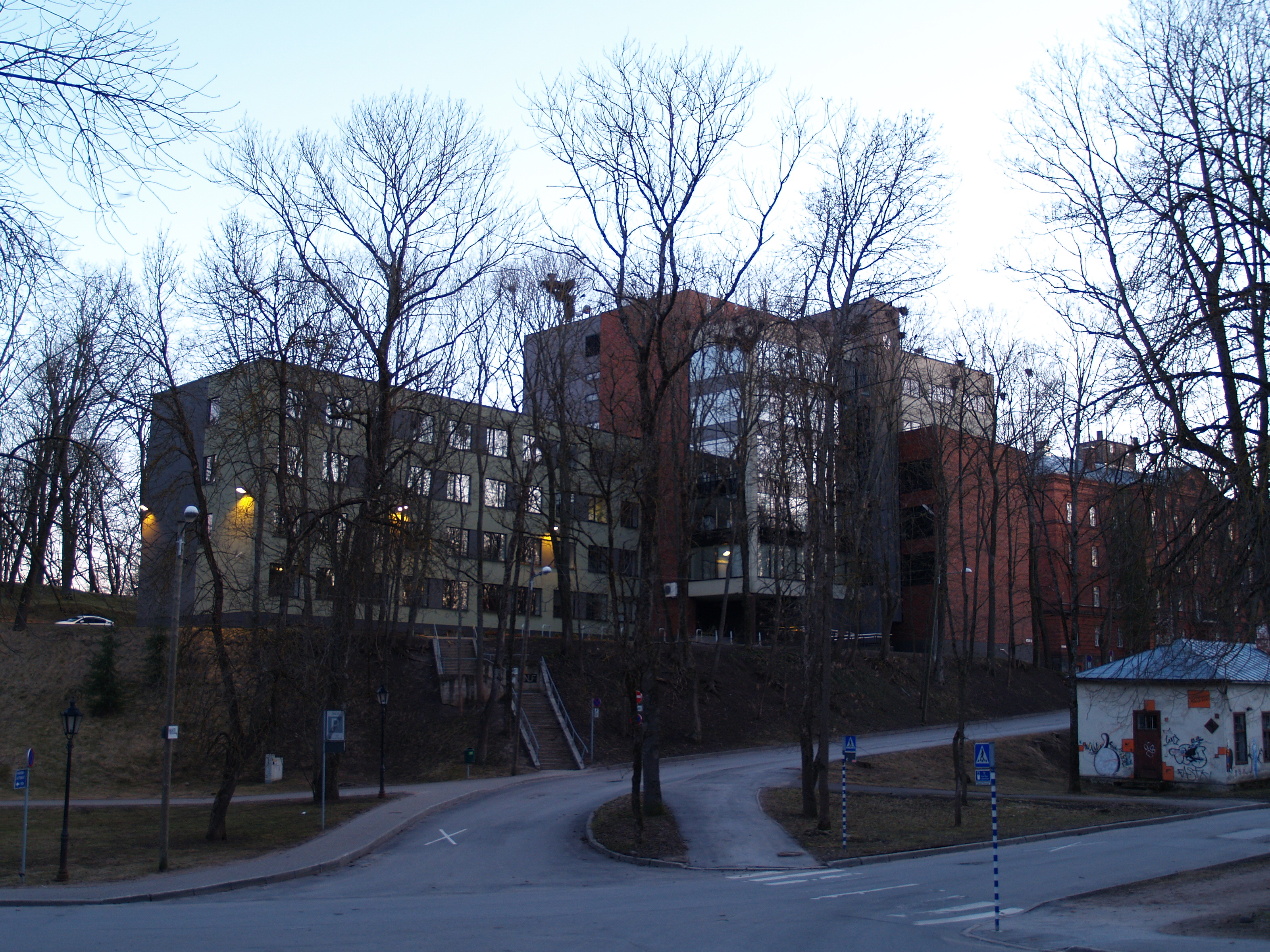 Tartu Ülikooli matemaatika-informaatikateaduskonna hoone aadressil Liivi 2.